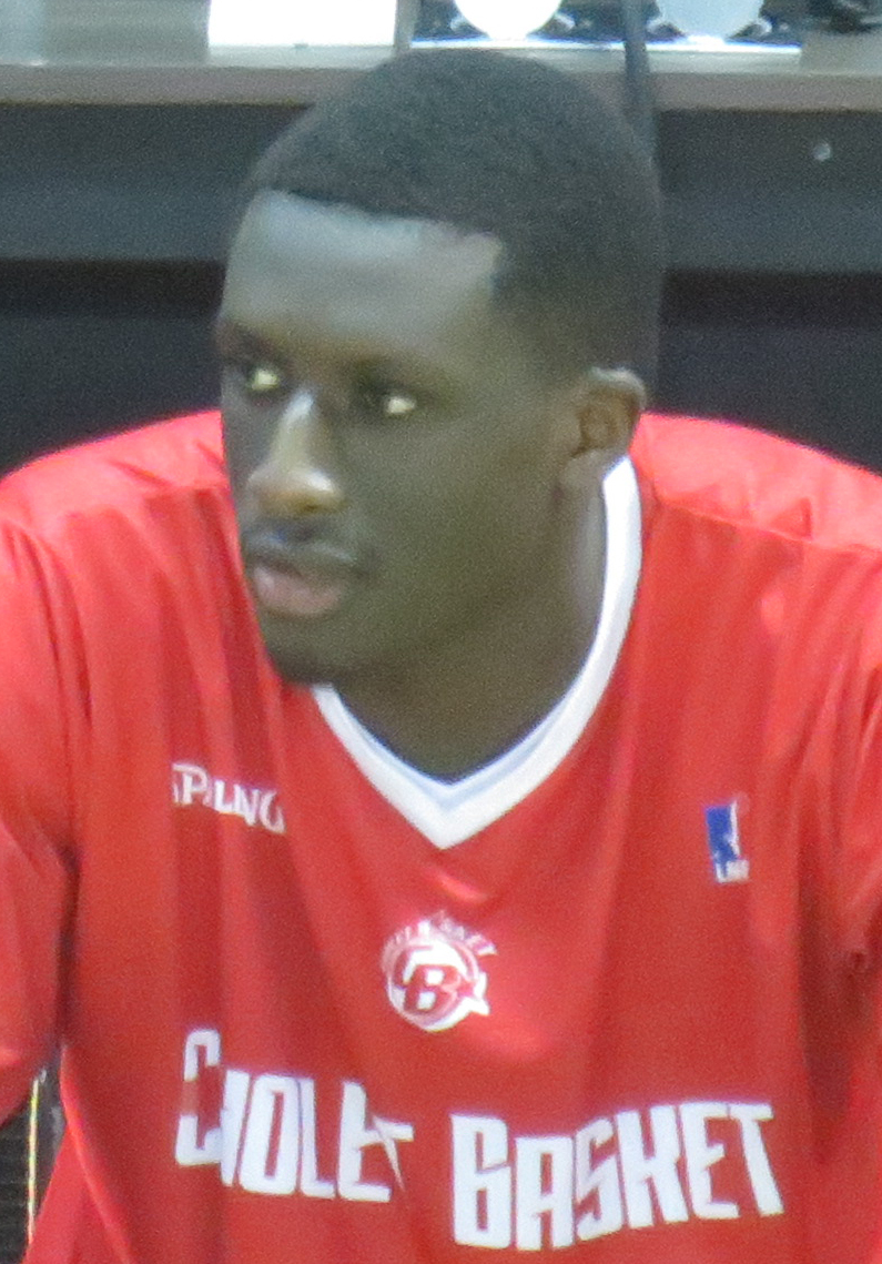 Abdoulaye N'Doye avant d'entrer en jeu le 12 octobre 2018 lors du match en déplacement chez le Fos Provence Basket dans le cadre de la cinquième journée du championnat 2018-2019 de Jeep Elite.